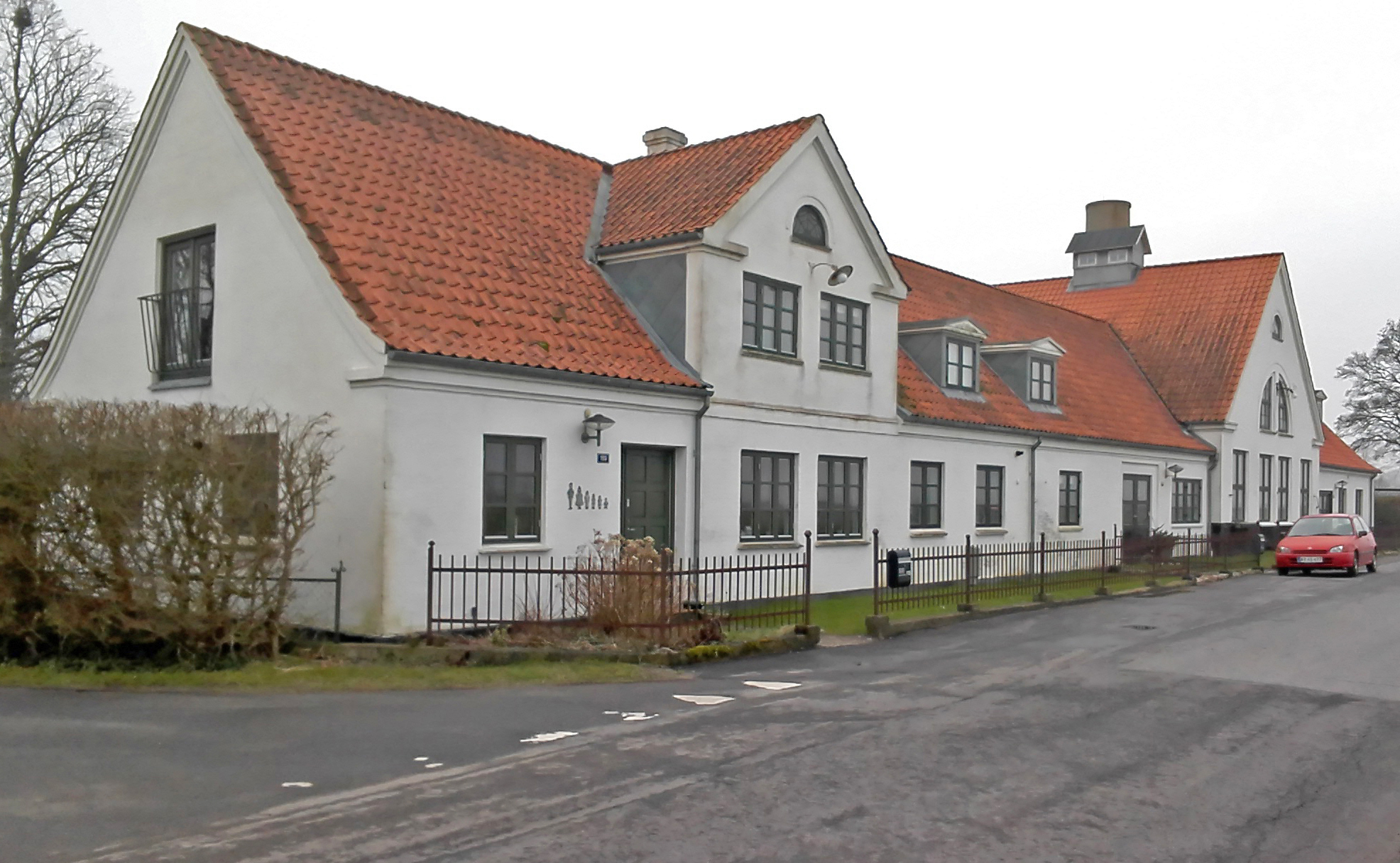 Ladbys tidligere mejeri